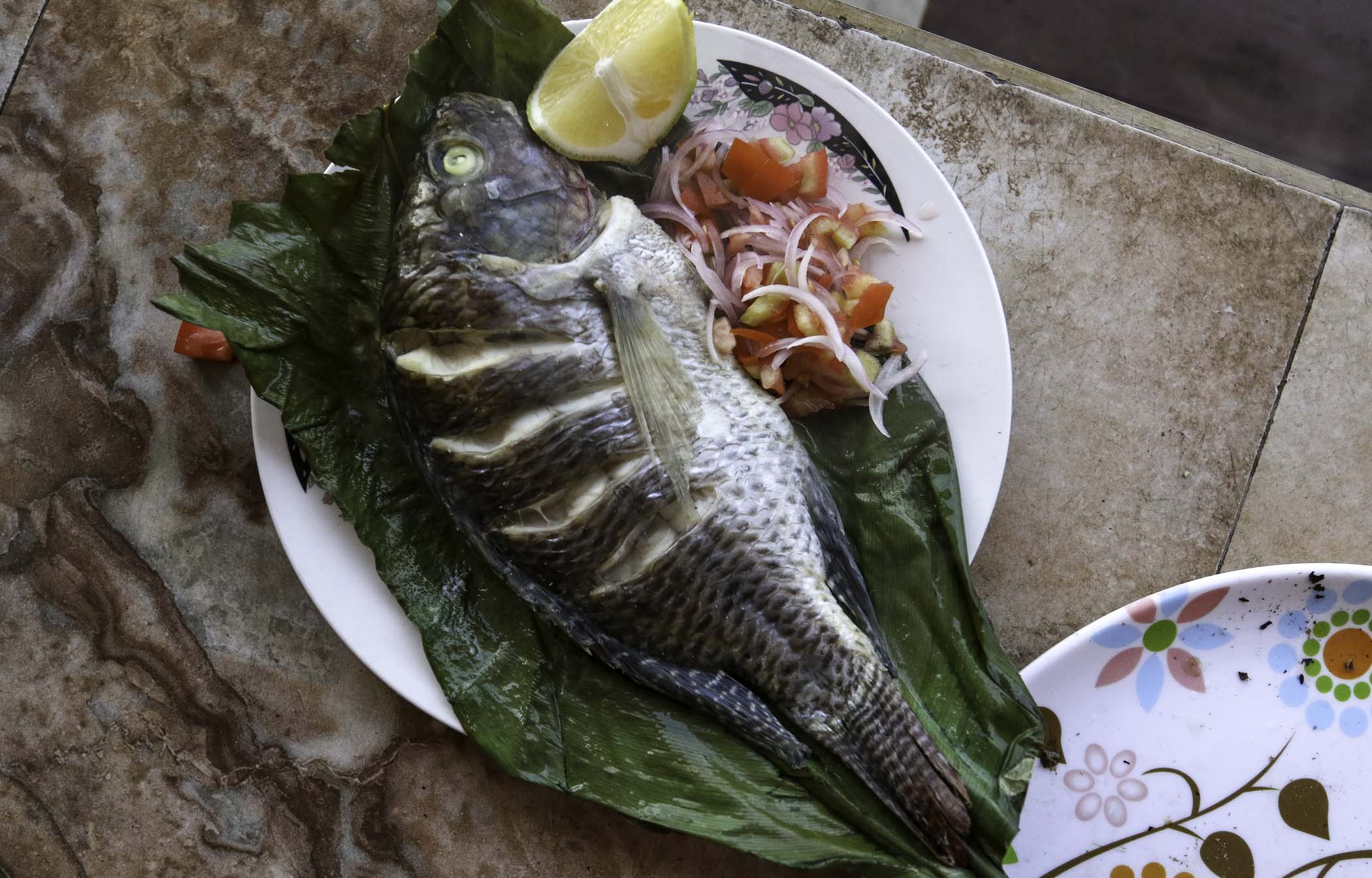 ARCHIDONA-GASTRONOMÍA